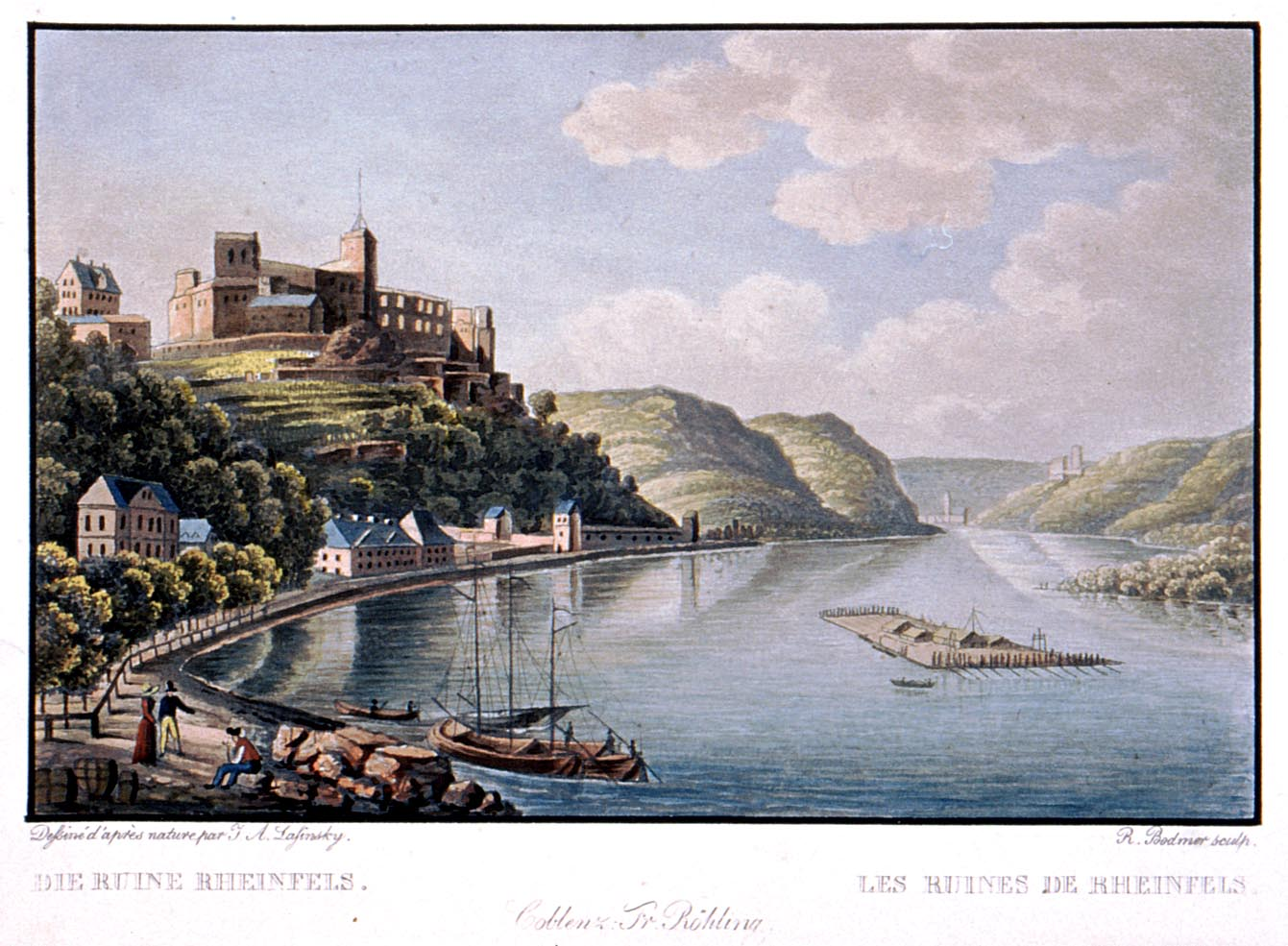 Altkolorierter Aquatintastich von R.Bodmer nach Vorlage von J.A. Lasinsky